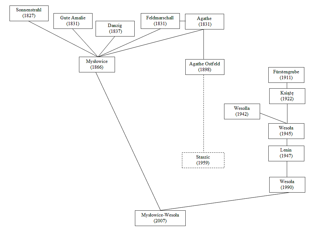 Stammbaum der Bergwerke des Verbundbergwerks Myslowice-Wesola